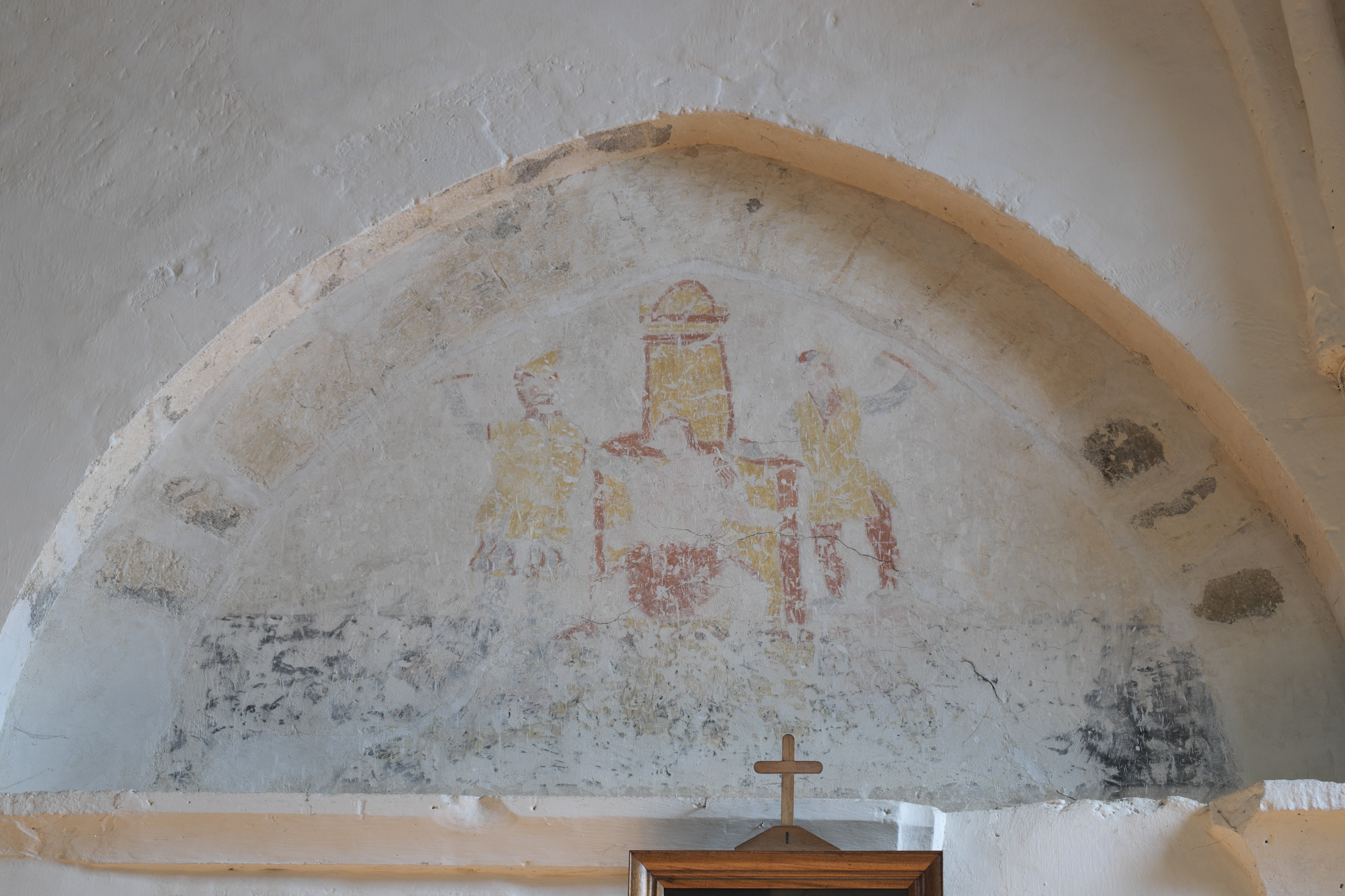 Katholische Pfarrkirche Saint-Quentin in Brières-les-Scellés im Département Essonne (Île-de-France/Frankreich), Wandmalerei; Darstellung: Martyrium des heiligen Quintinus